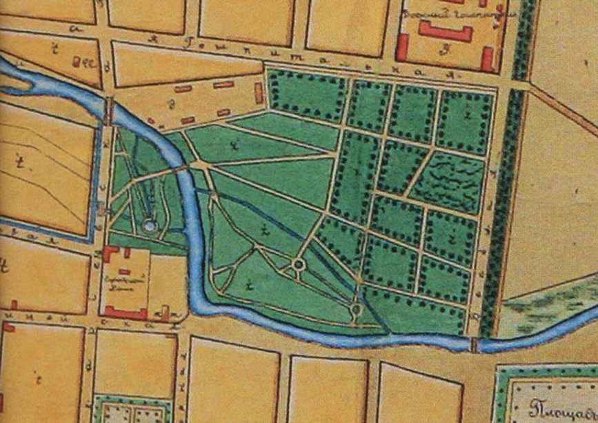 Беларуская (тарашкевіца): Менск (Miensk). Плян места